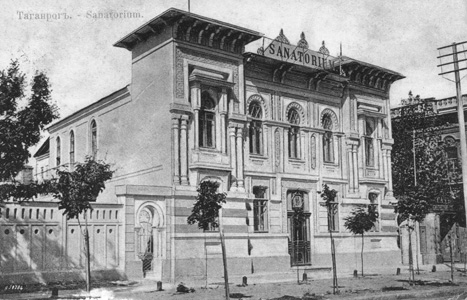 Санаторий Гордона, Таганрог Ростовская область РФ